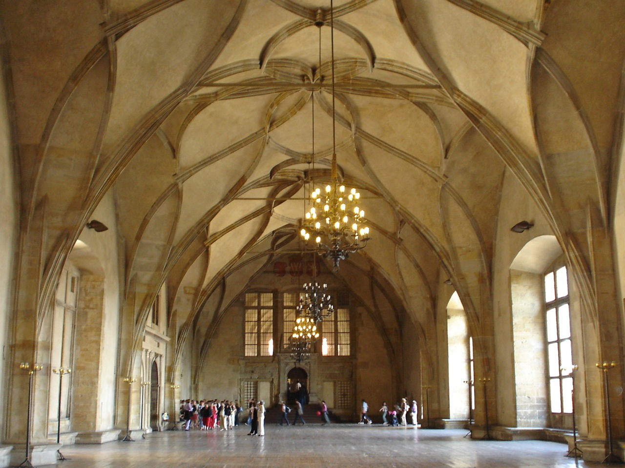 Pražský hrad, Starý královský palác, Vladislavský sál